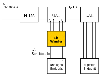 BlockISDN mit a/b-Wandlert